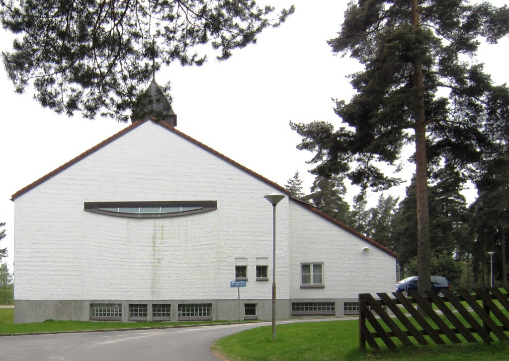 Nenset kirke, Skien